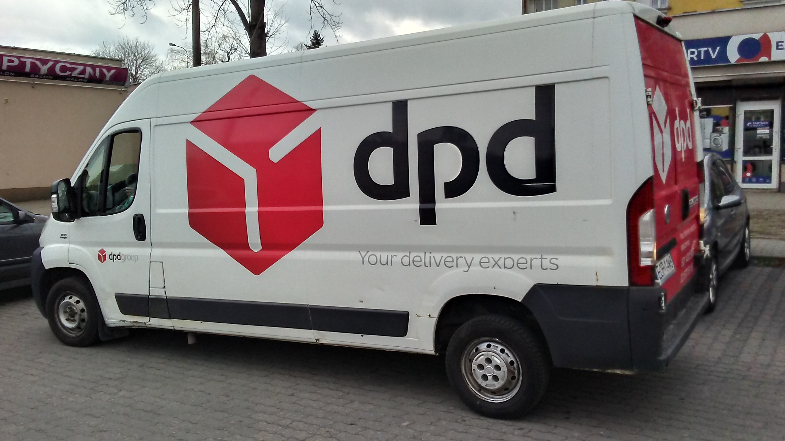 Samochód firmy kurierskiej DPD, w Tomaszowie Mazowieckim, PL